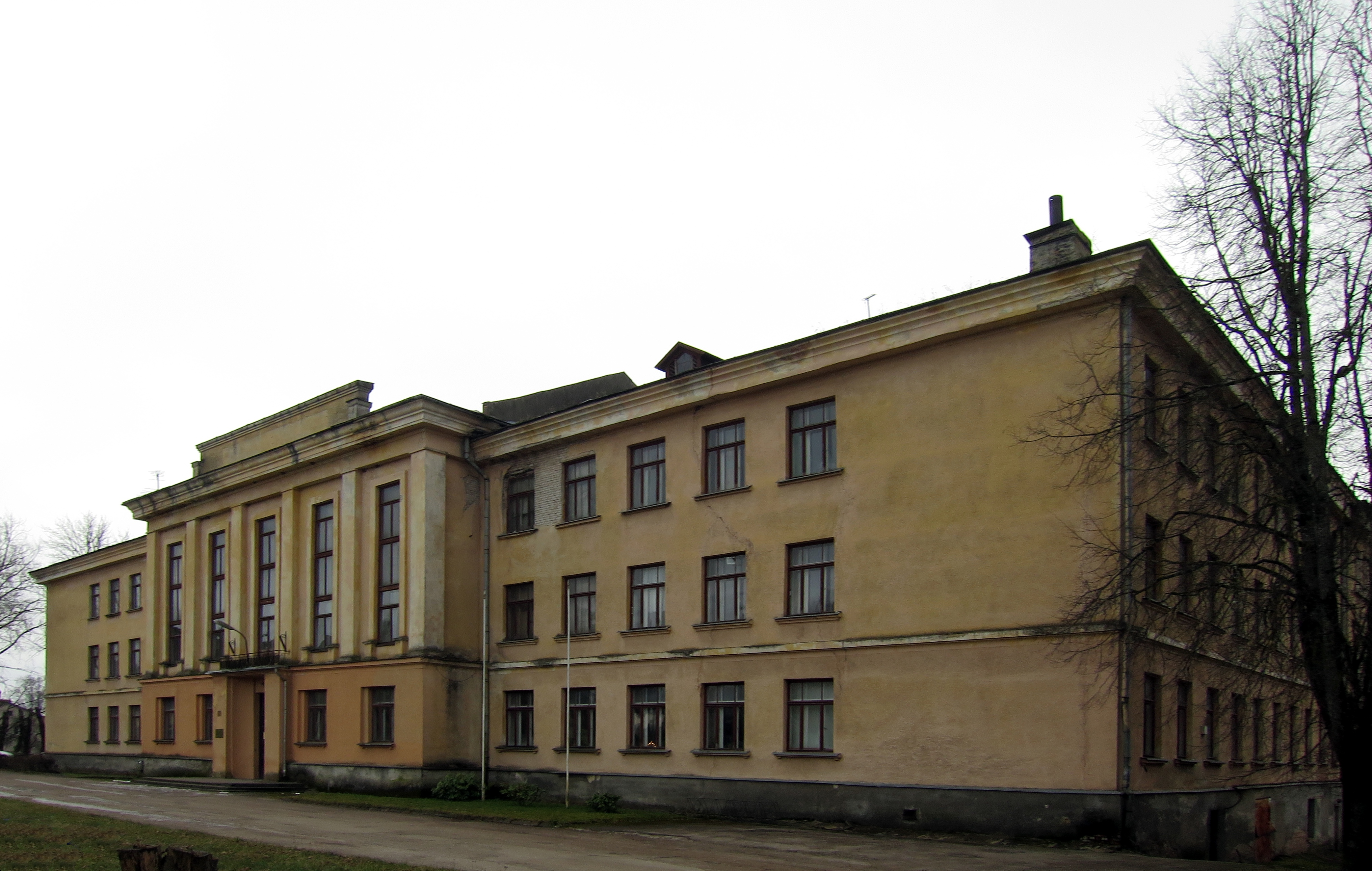 Zemkopības zinātniskā institūta ēka